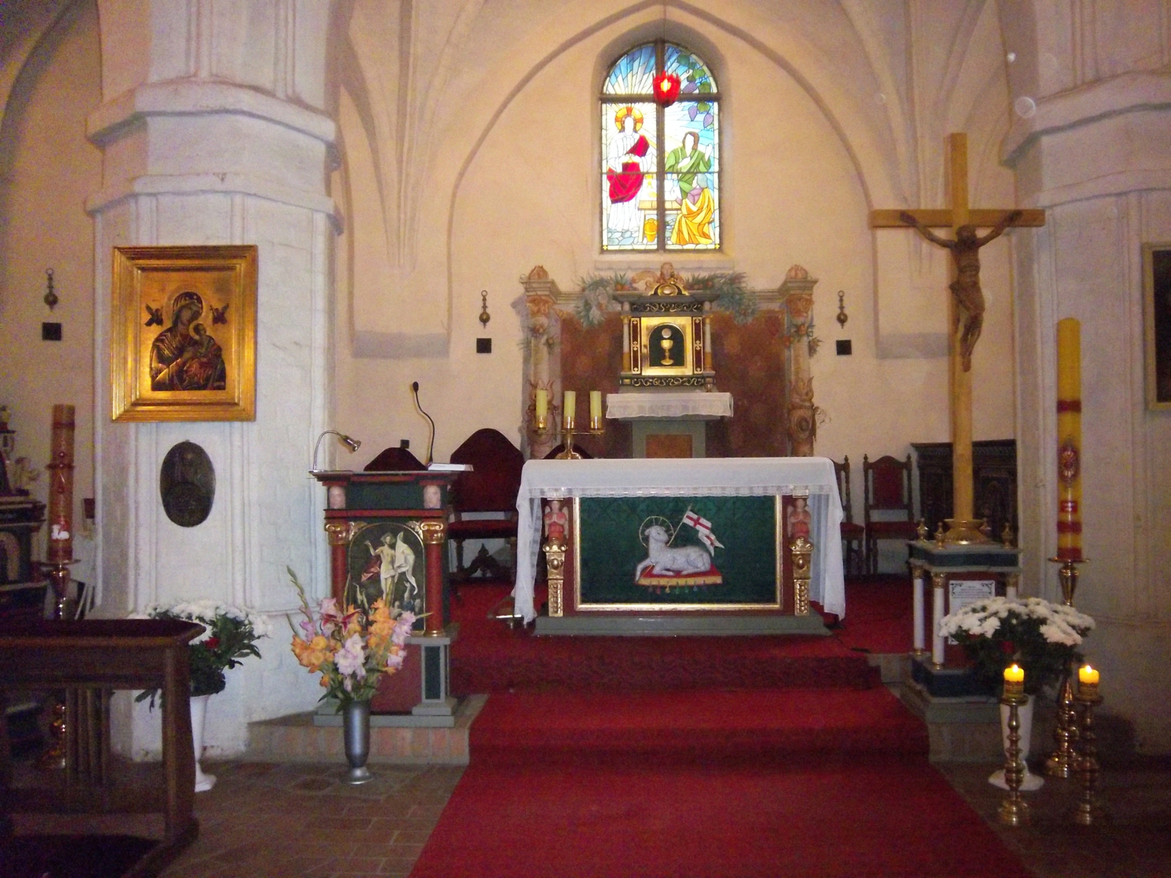 Kościół św. Gertrudy w Darłowie